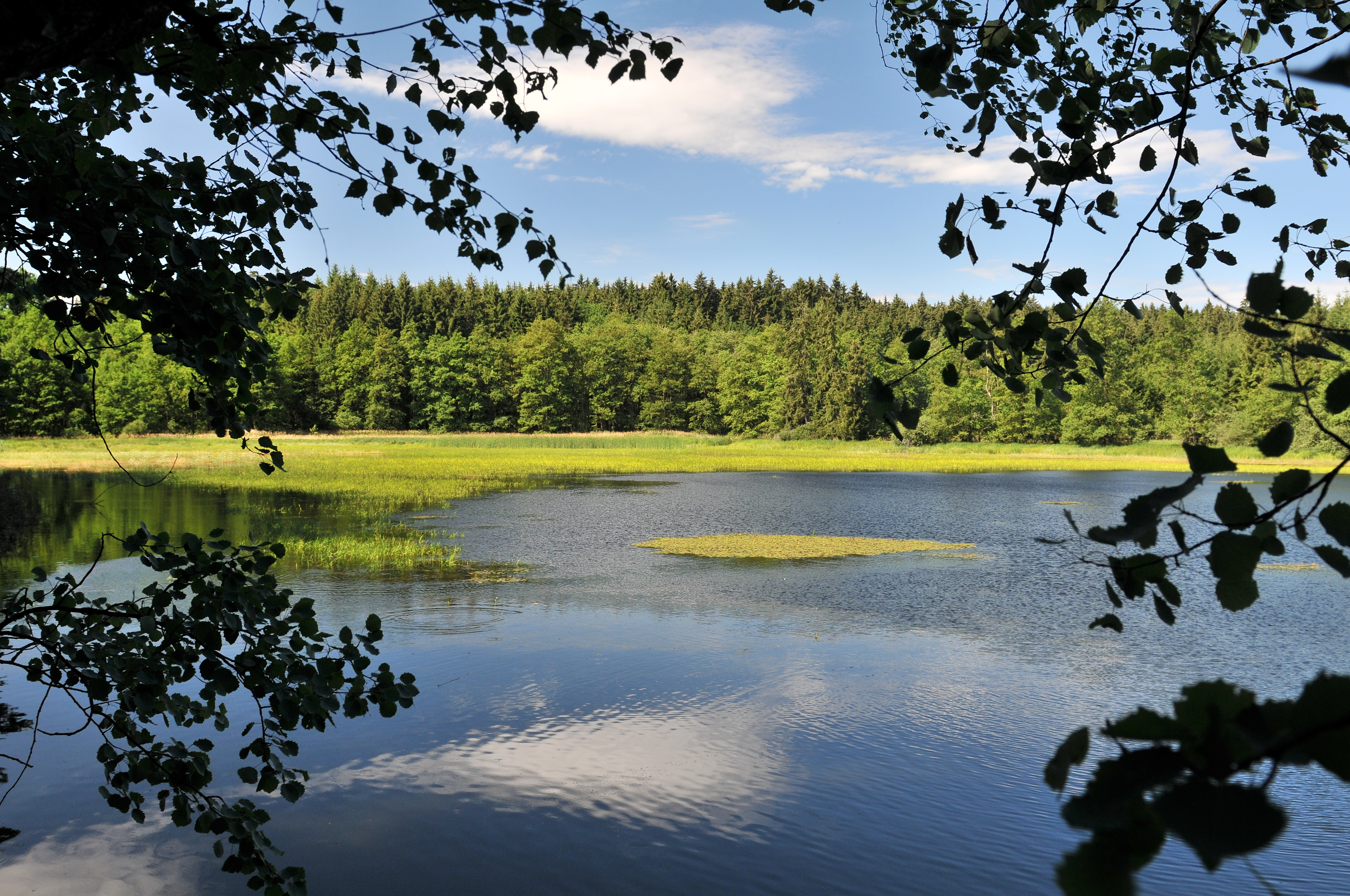 PP Rybníky V Pouštích